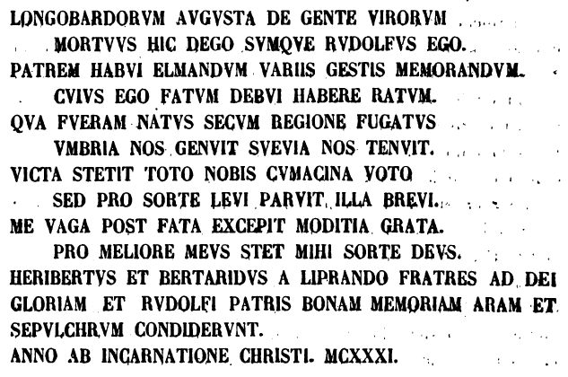 L'epitaffio appartiene a un certo signore, chiamato Rodolfo, di origine longobarda, il quale con Elmando, suo padre, scacciato dall'Umbria, che era il suo luogo d'origine, fu costretto a portarsi in Svevia. Ottenne poi dal re il governo e la signoria dell'Isola Comacina, se non anche di tutto il territorio di Como, ed avendo trovato delle resistenze se ne impadronì con il proprio esercito. In seguito, dopo breve tempo, tornò a perdere tutto ciò che aveva conquistato. Allora egli si ritirò a Monza, dove terminò in pace i suoi giorni, lasciando due figli, Eriberto e Bertarido da Liprando. Questi, per onorare la memoria del proprio padre, costruirono una cappella, presso la quale ne posero il sepolcro nell'anno 1131. La nobile famiglia Aliprandi fiorì poi in Monza e nel XIV secolo a Milano.